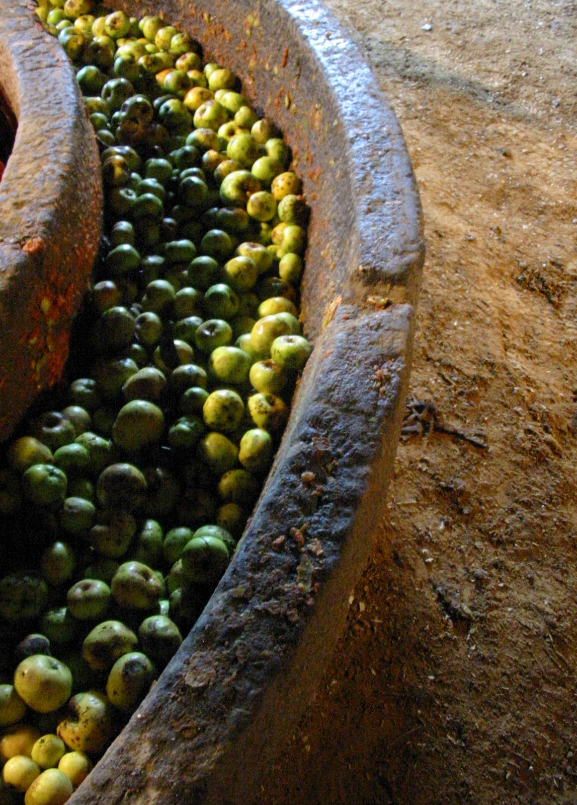 La Faîs'sie d'Cidre à Hamptonne 2007